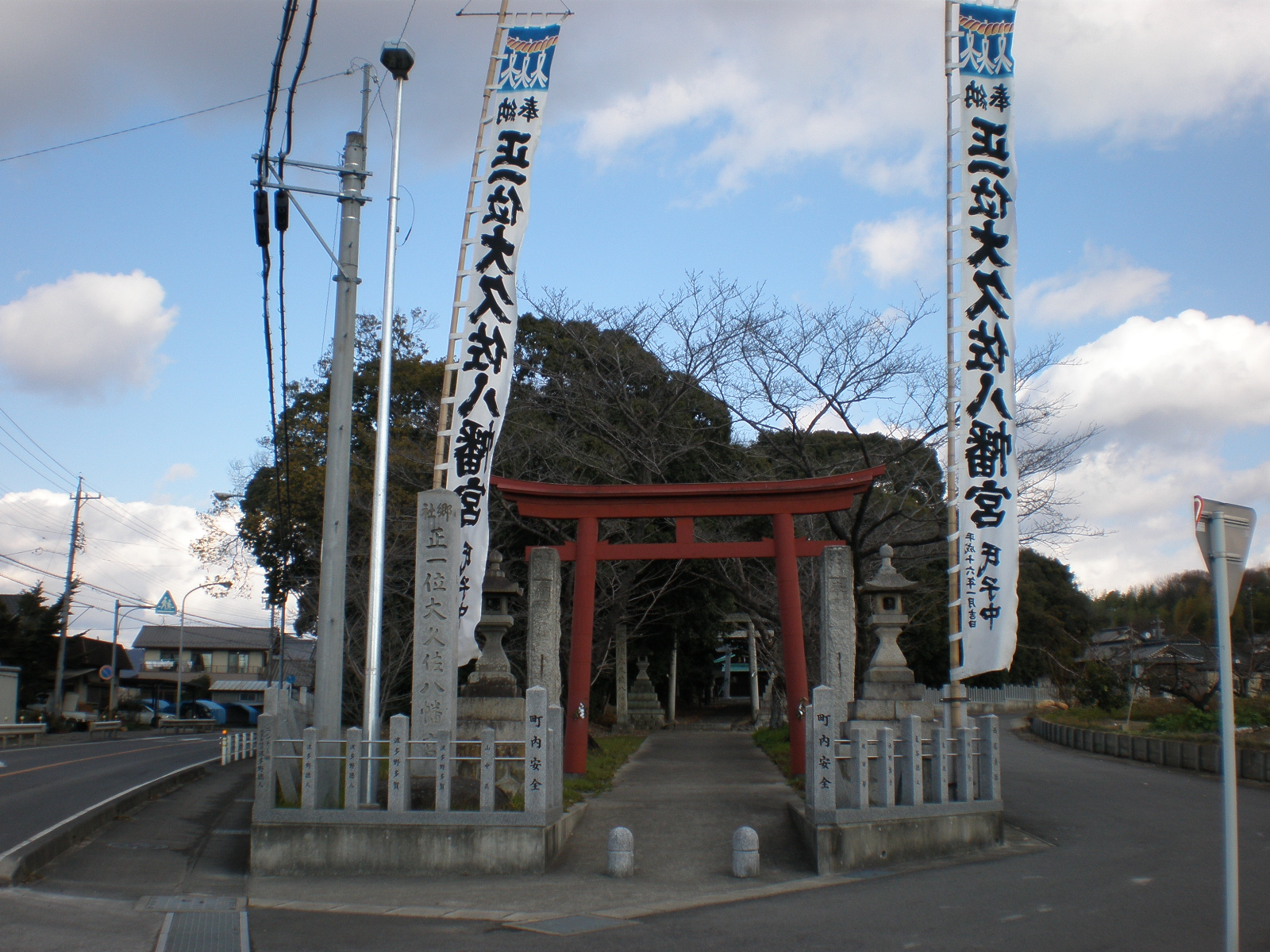 愛知県小牧市にある大久佐八幡宮